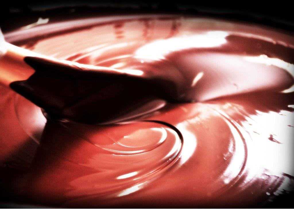 תחום מפעלים בקבוצת שכולו טוב